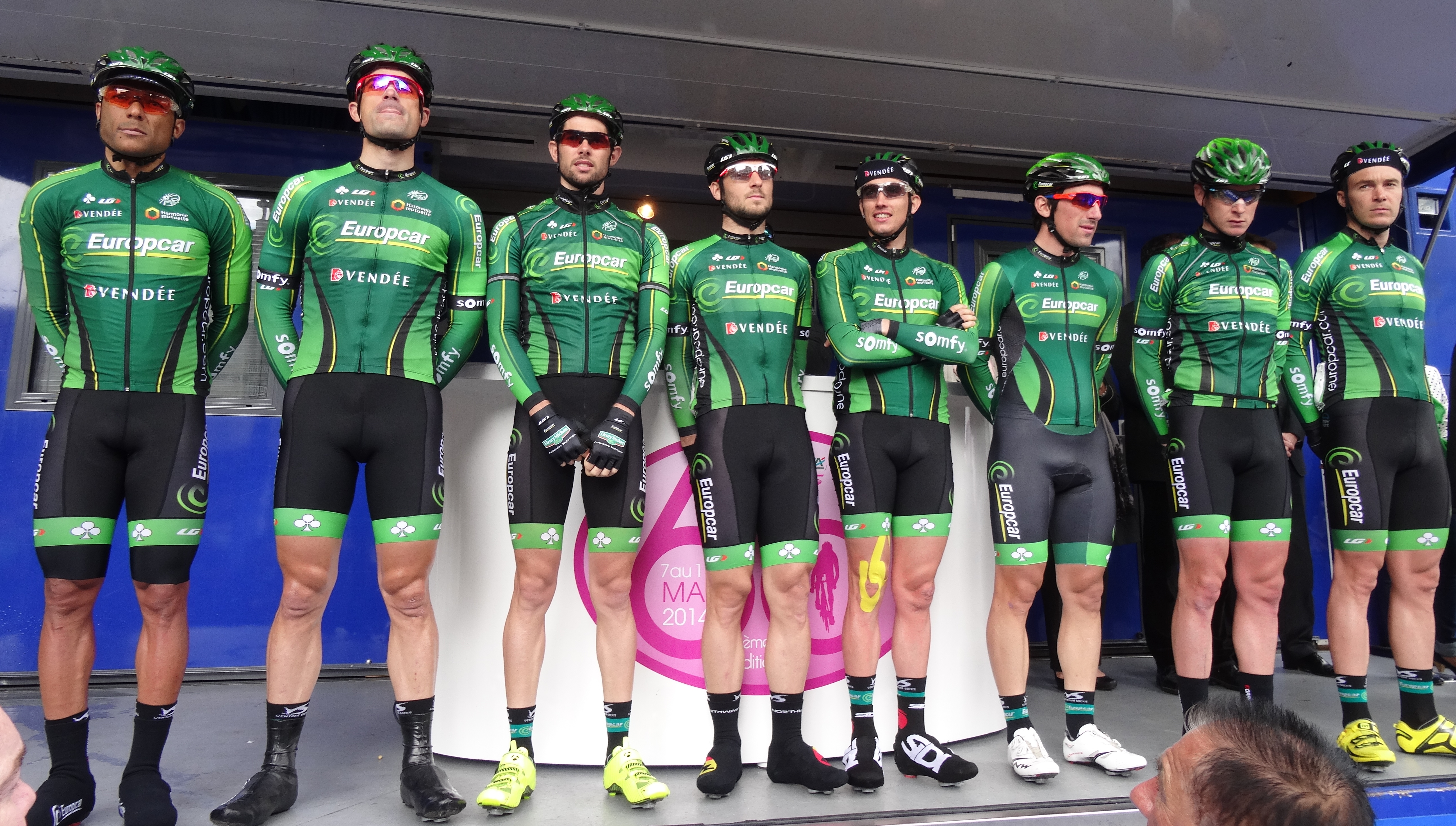 Reportage photographique réalisé le mercredi 7 mai 2014 au départ de la première étape de l'édition 2014 des Quatre jours de Dunkerque à Dunkerque, Nord, Nord-Pas-de-Calais, France. Depicted people: Yohann Gène, Jimmy Engoulvent, Bryan Nauleau, Morgan Lamoisson, Vincent Jérôme, Yannick Martinez, Alexandre Pichot and Christophe Kern Depicted team: Europcar